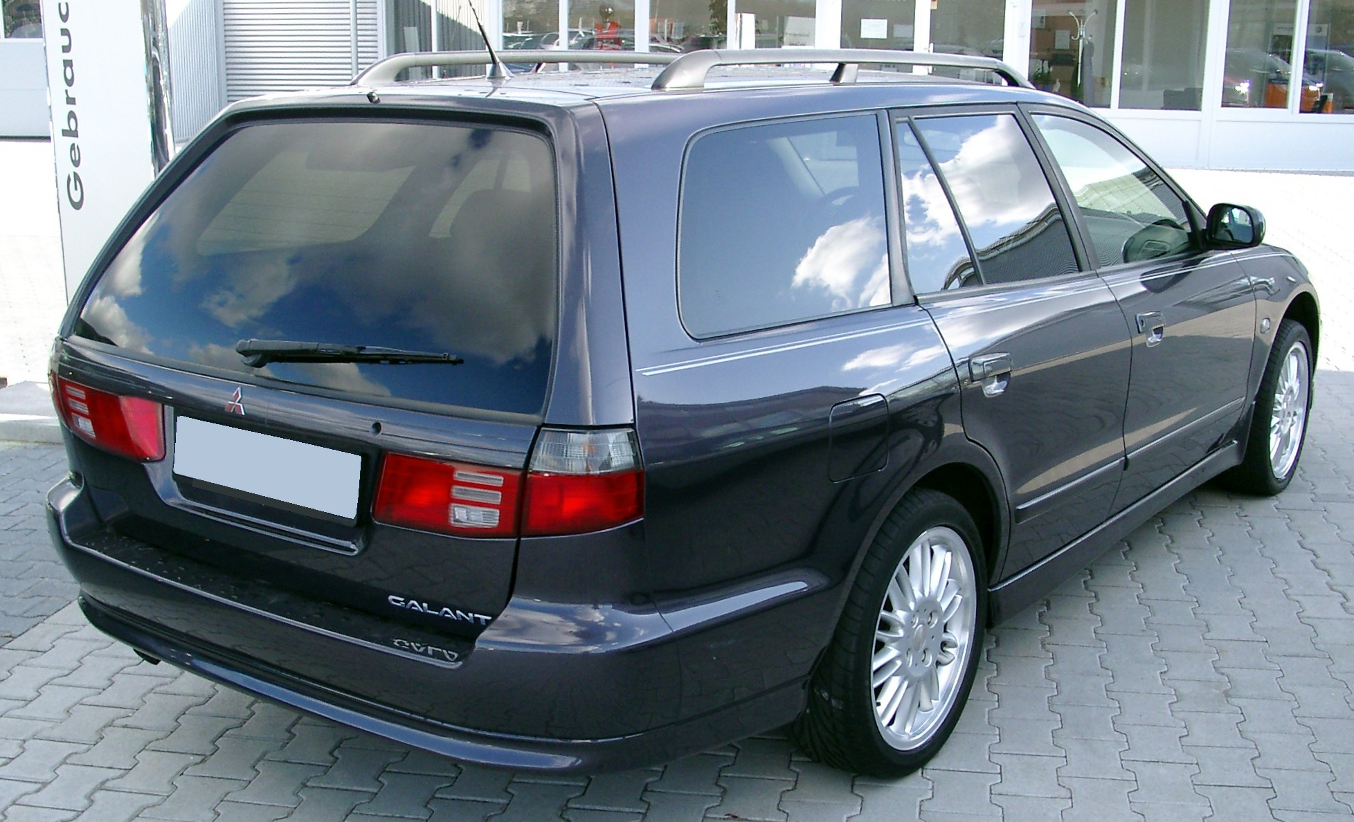 Mitsubishi Galant Kombi, 8. Generation